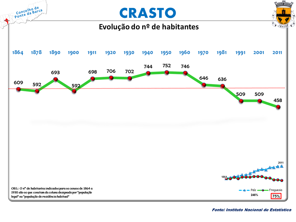 Censos 1864/2011